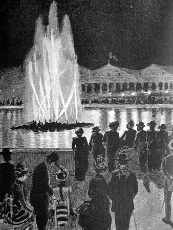 Fuente Mágica de la Exposición Universal de Barcelona de 1888.